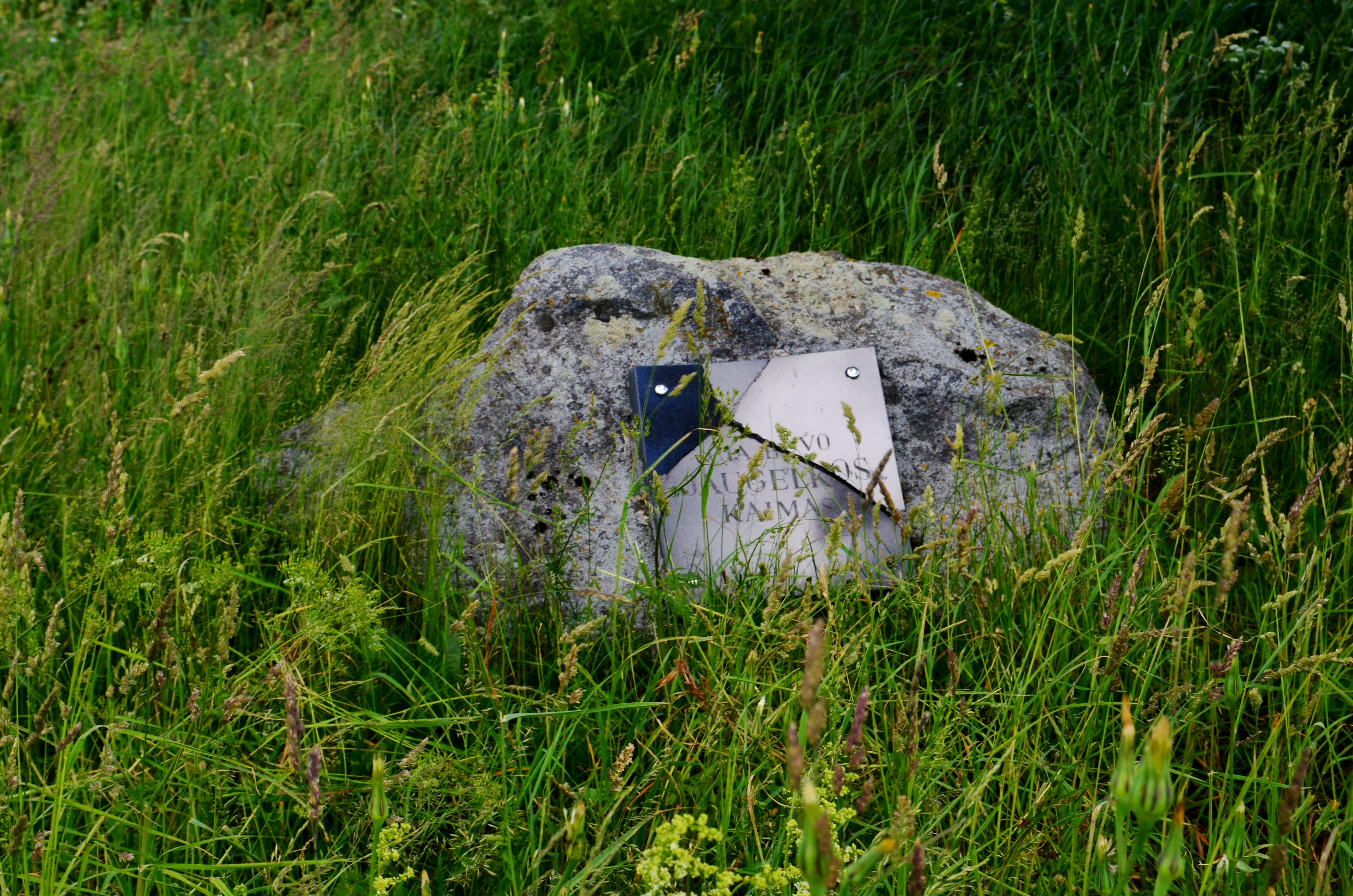 Paminklinis akmuo Jaugilkos (Jaugelkos) kaimui, Kėdainių raj.